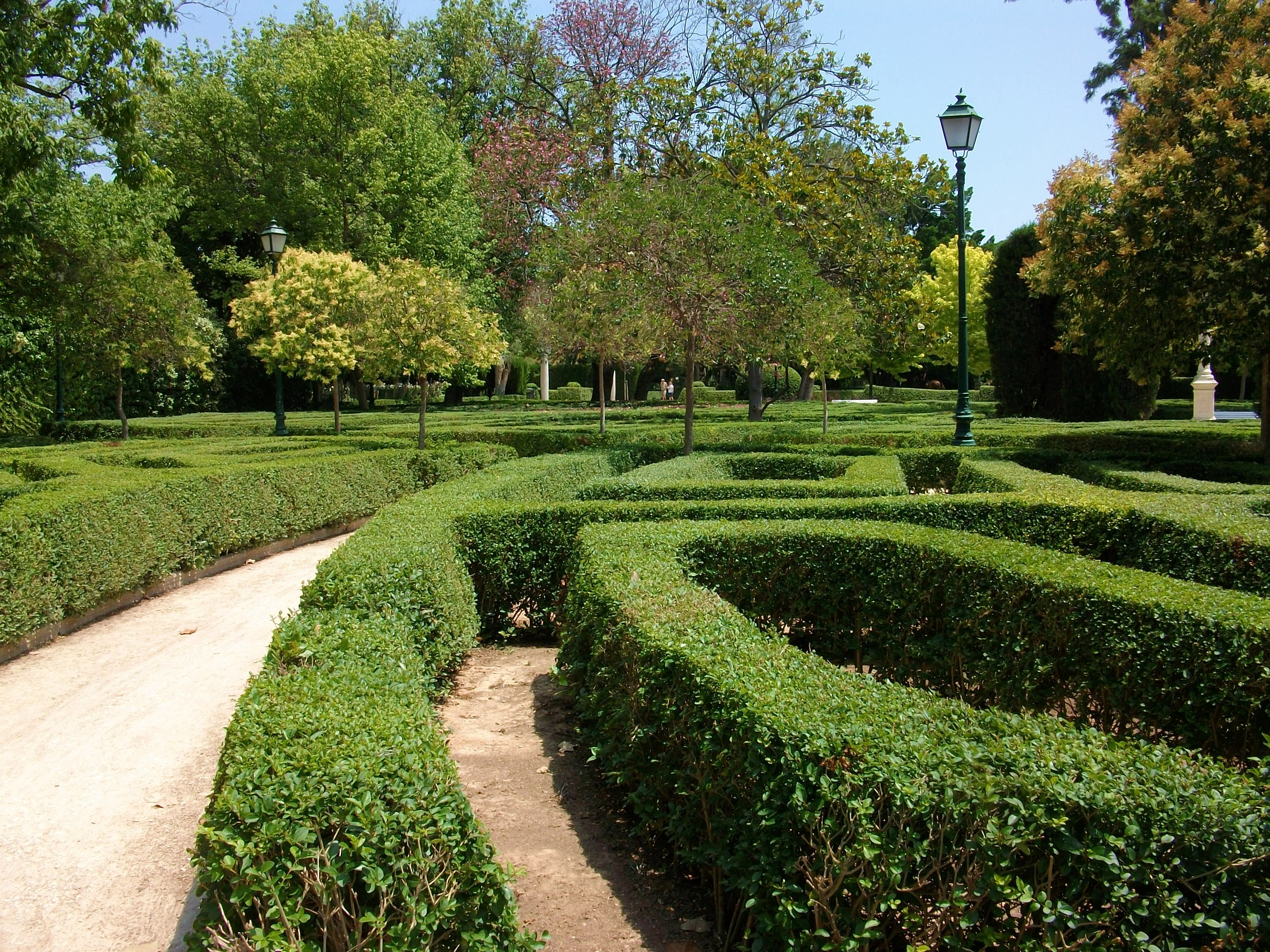 Jardins del Real o de Vivers a València, País Valencià.